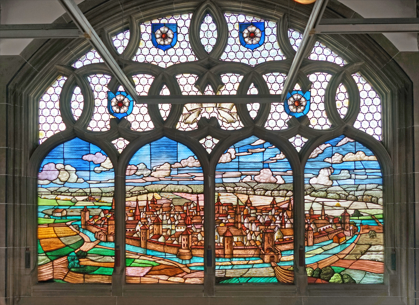 Vitrail d'Auguste Schuler représentant Haguenau en 1622 selon une gravure de Jacob Van der Heyden (1573-1645) Vitrail situé au rez-de-chaussée du musée historique de Haguenau (Du Moyen-Âge à la guerre de Trente ans) Le bâtiment de style néo-Renaissance allemande, teinté d'art nouveau, date de 1905, il a été conçu par les architectes Kuder et Müller de Strasbourg sous l'impulsion du maire de l'époque Xavier Nessel (1834-1905), archéologue et érudit.